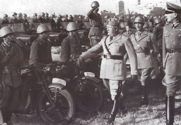 Reparti dello CSIR schierati durante la visita di Mussolini al fronte russo